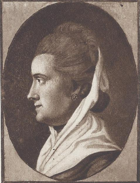 Abbildung eines Aquarells der Katharina von Zimmermann aus der Studiensammlung Lavater, abgebildet und entnommen aus: Goethe ein Bilderbuch, Günther Schulz Verlag, Leipzig, 1931, Tafel Nr. 76